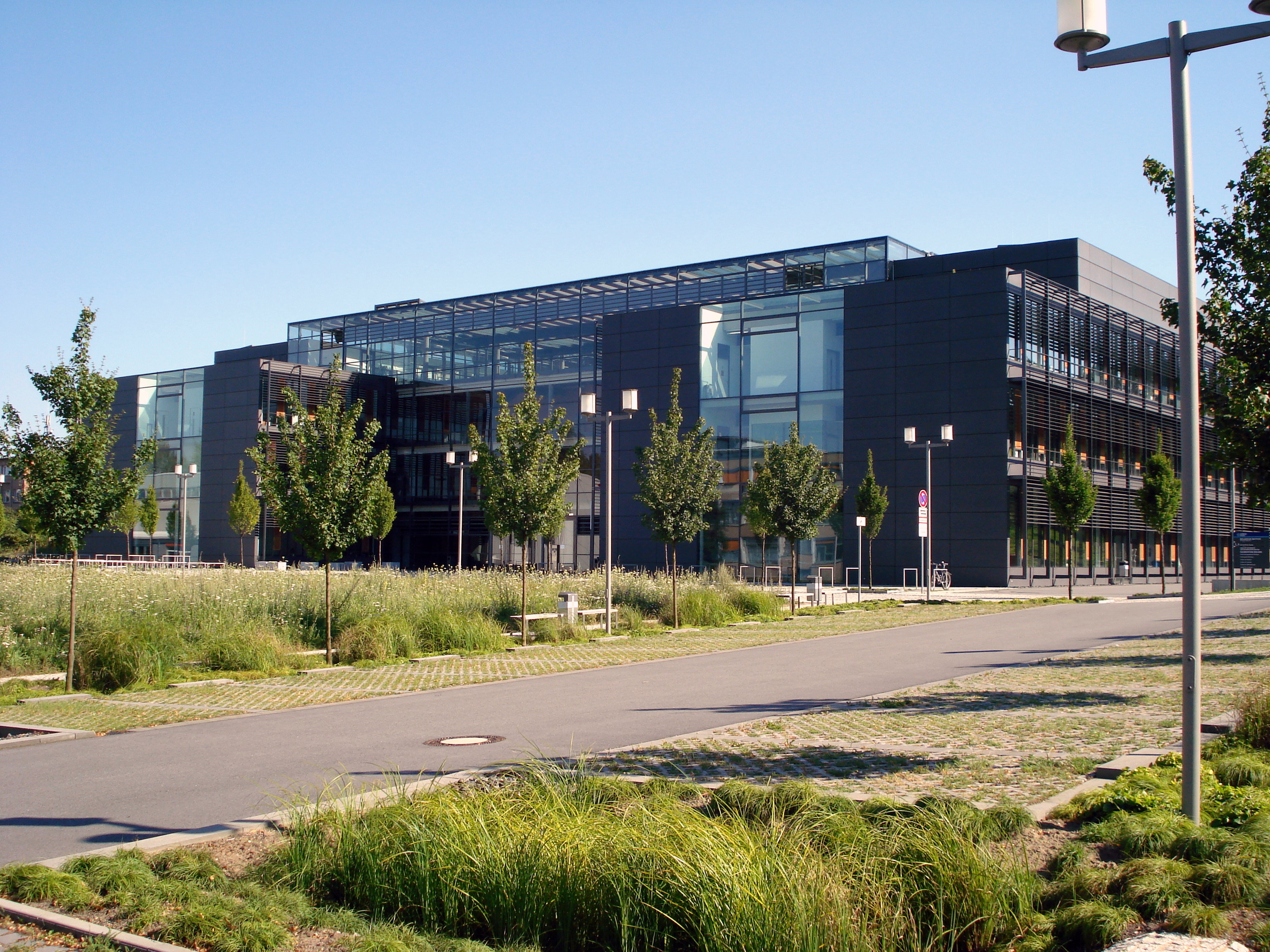 TU Dresden, Biologie-Gebäude